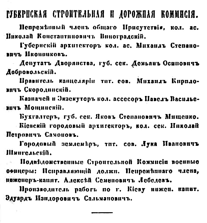 Состав Киевской губернской строительной и дорожной комиссии на 1856 год